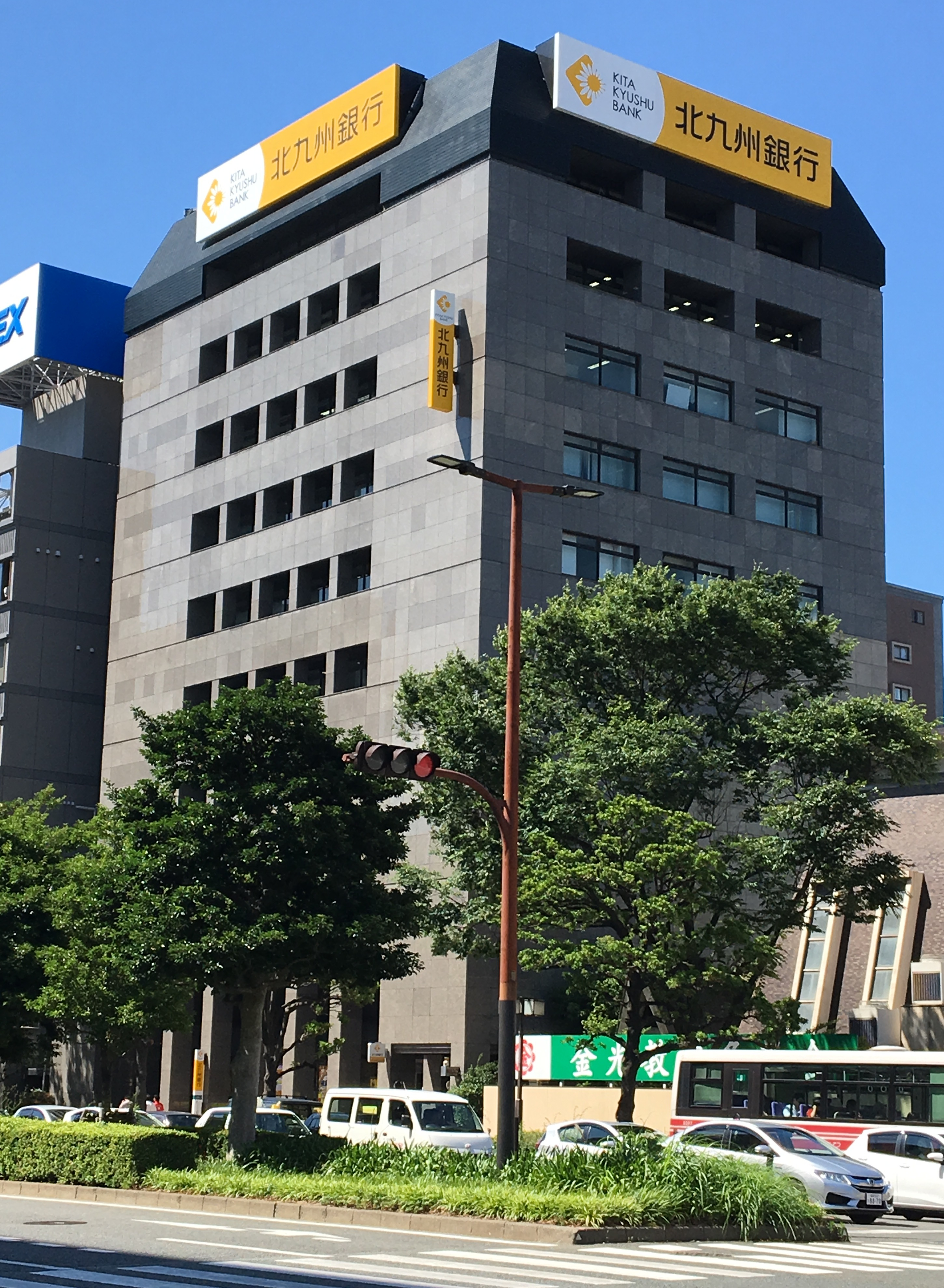 北九州銀行呉服町ビルです